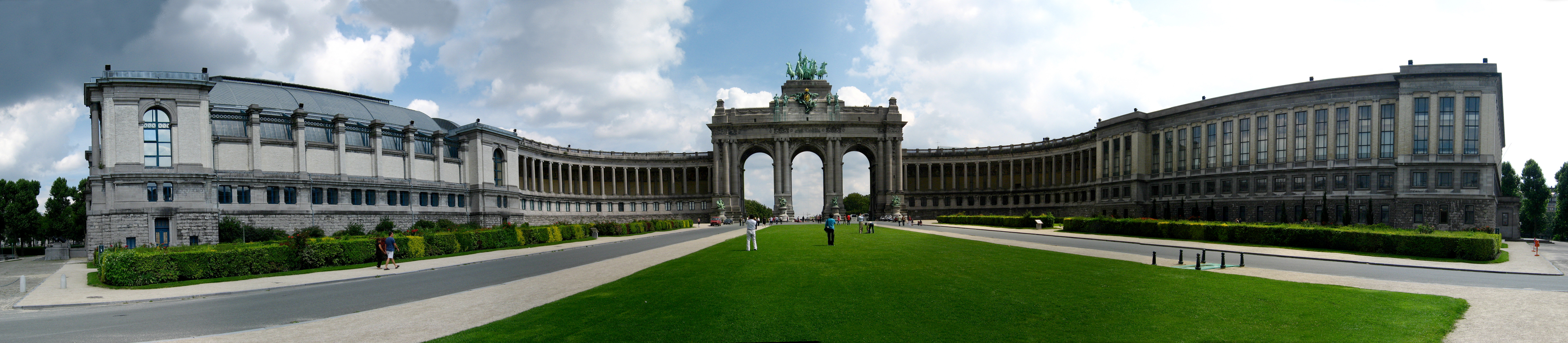 Cinquantenaire in Brussels.